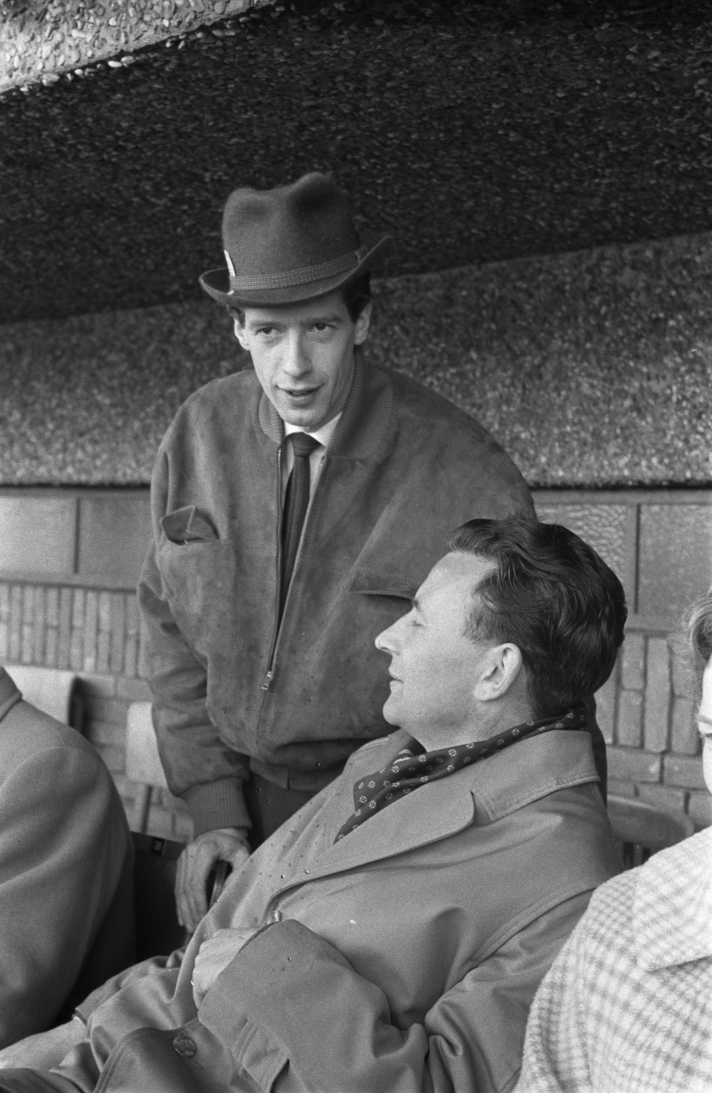 Collectie / Archief : Fotocollectie Anefo Reportage / Serie : [ onbekend ] Beschrijving : Nederland tegen Bulgarije 4-2 in het Olympisch Stadion Rudy Carrell op de tribune Datum : 3 april 1960 Locatie : Bulgarije, Nederland Trefwoorden : tribunes Persoonsnaam : Rudy Carrell Instellingsnaam : Olympisch Stadion Fotograaf : Pot, Harry / Anefo Auteursrechthebbende : Nationaal Archief Materiaalsoort : Negatief (zwart/wit) Nummer archiefinventaris : bekijk toegang 2.24.01.05 Bestanddeelnummer : 911-1435